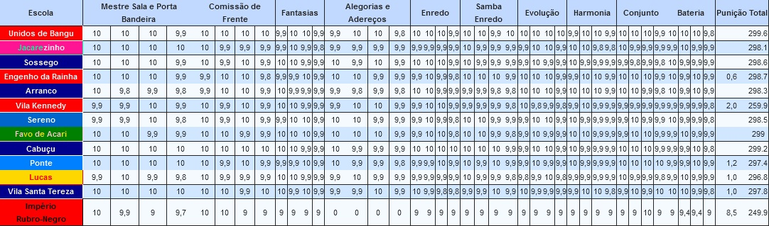 Resultados do Carnaval do Rio - 2014 - Grupo B